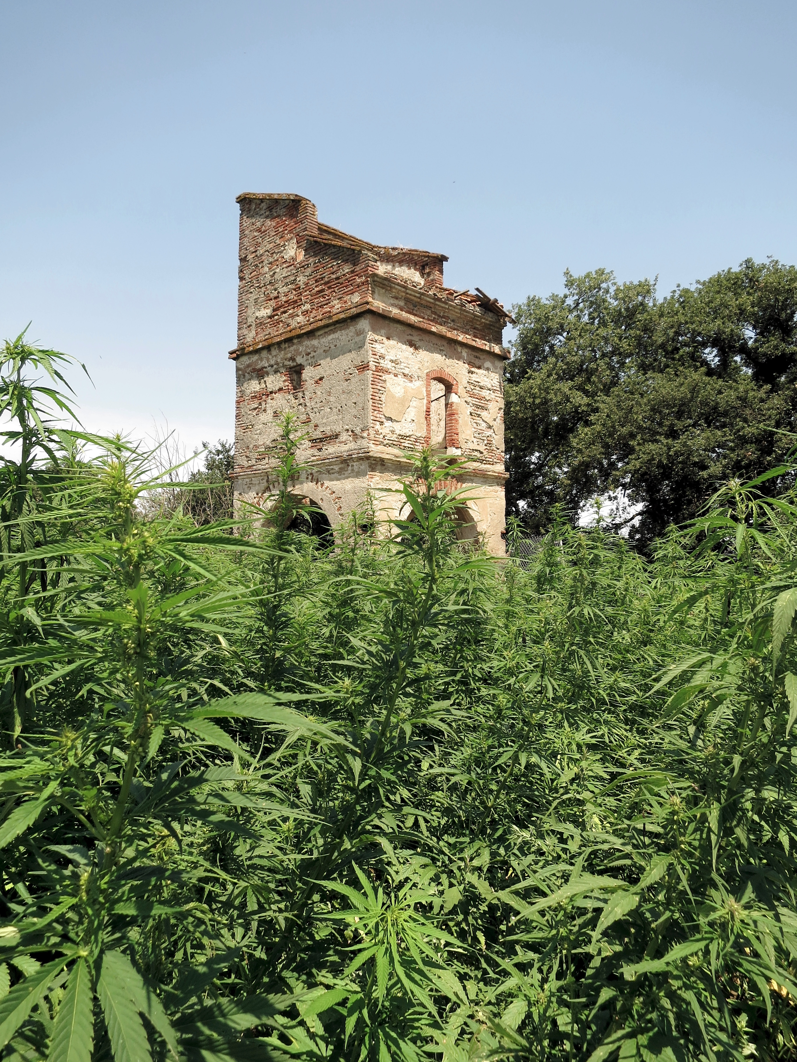 Toulouse (Haute-Garonne, Midi-Pyrénées, France) : Colombier dans une chanvrière.